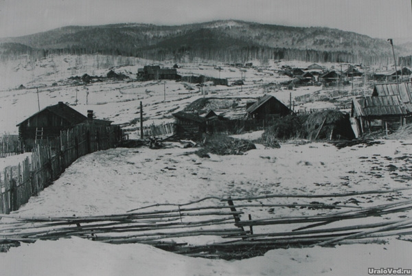 Посёлок Слюдорудник в 1960-х годах